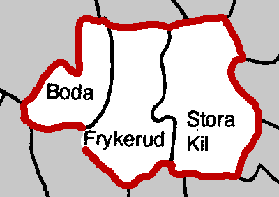 old municipalities